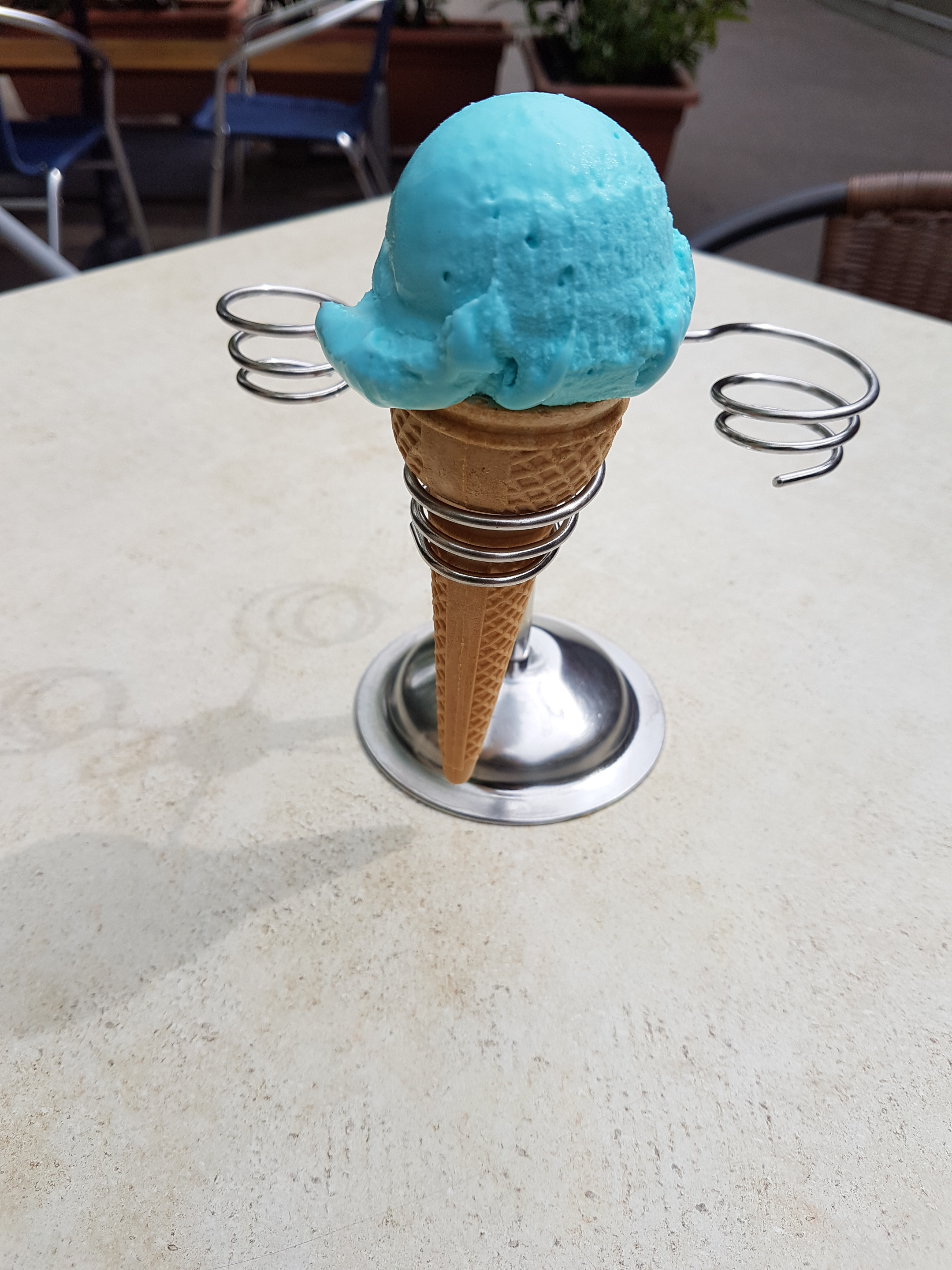 Schlumpfeis aus einer Eisdiele